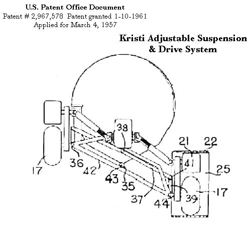 US Patent 2967578